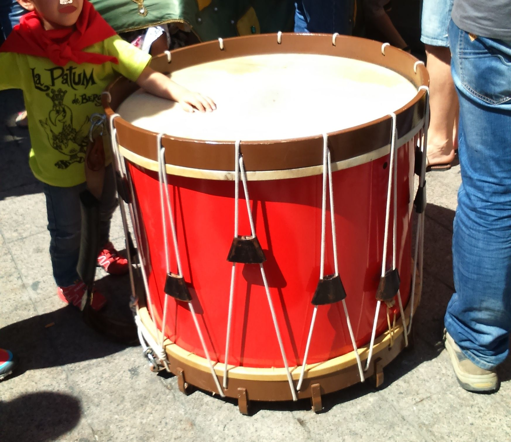 Detall del Tabal de la patum de Berga